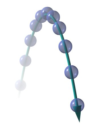 Trajectòria parabòlica d'un cos. Dibuixat per mi, Arturo Reina Sánchez, el 2 de Gener del 2005.